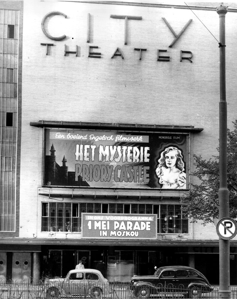 In het City Theater draait Het mysterie van Priory Castle (The Case of the Frightened Lady, regie George King, Engeland, 1940) met in het voorprogramma '1 Mei-parade in Moskou', Amsterdam, 8 mei 1947 Foto Ben van Meerendonk / AHF, collectie IISG, Amsterdam Meer over de filmindustrie? Klik ook eens door in onze beeldbank.